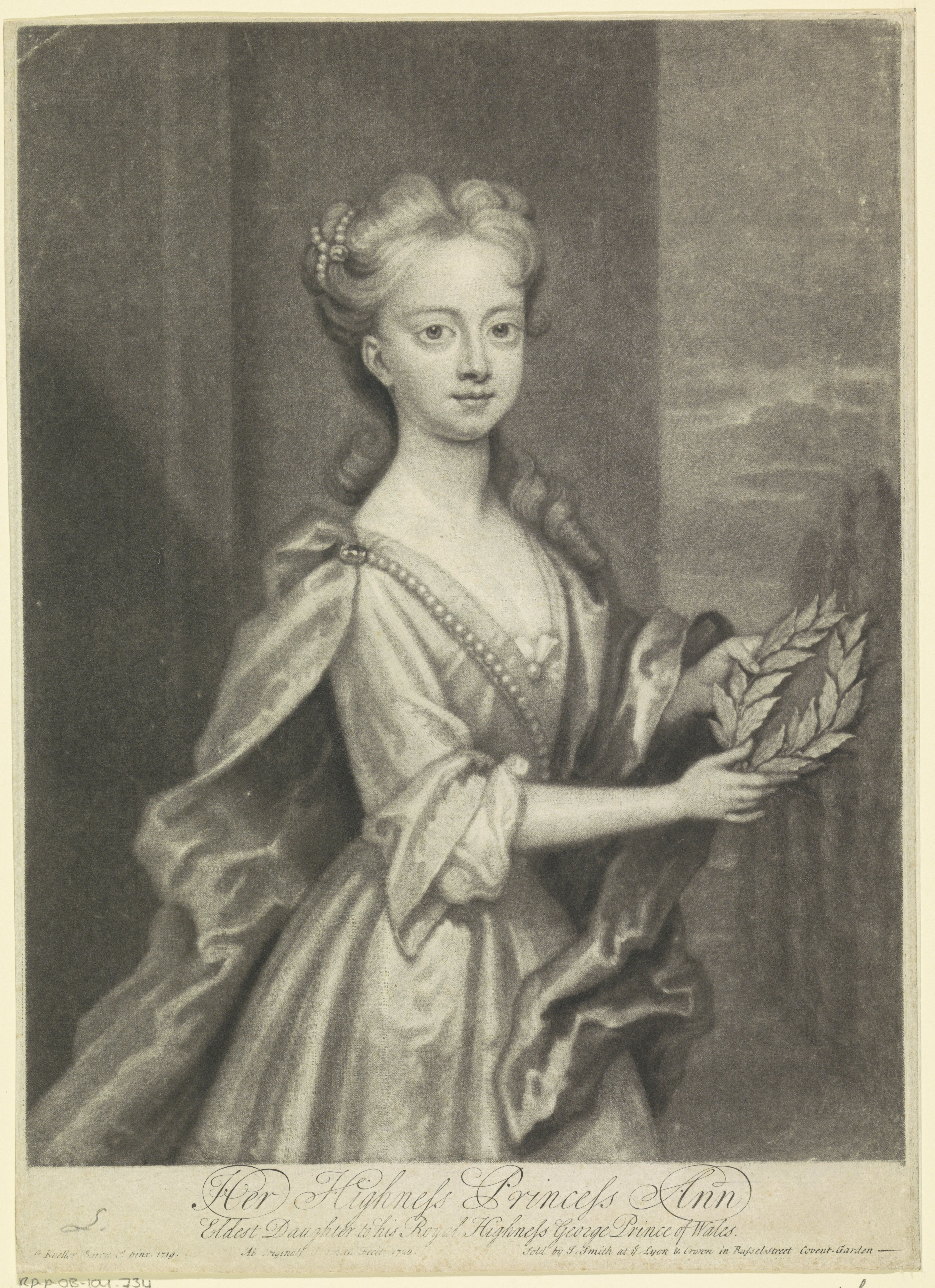 IdentificatieTitel(s): Portret van Anna van HannoverObjecttype: prent Objectnummer: RP-P-OB-104.734Catalogusreferentie: Van Someren 493Opschriften / Merken: verzamelaarsmerk, verso midden, gestempeld: Lugt 2228Omschrijving: Portret van Anna. In haar handen een lauwerkrans. In de ondermarge twee regels Engelse tekst.VervaardigingVervaardiger: prentmaker: John Smith (prentmaker/ uitgever) (vermeld op object)naar schilderij van: Gottfried Kneller (vermeld op object)uitgever: John Smith (prentmaker/ uitgever) (vermeld op object)Plaats vervaardiging: LondenDatering: 1720Fysieke kenmerken: mezzotintMateriaal: papier Techniek: mezzotintAfmetingen: blad: h 350 mm × b 252 mmOnderwerpWie: Anna van HannoverVerwerving en rechtenVerwerving: onbekend 2013Copyright: Publiek domein